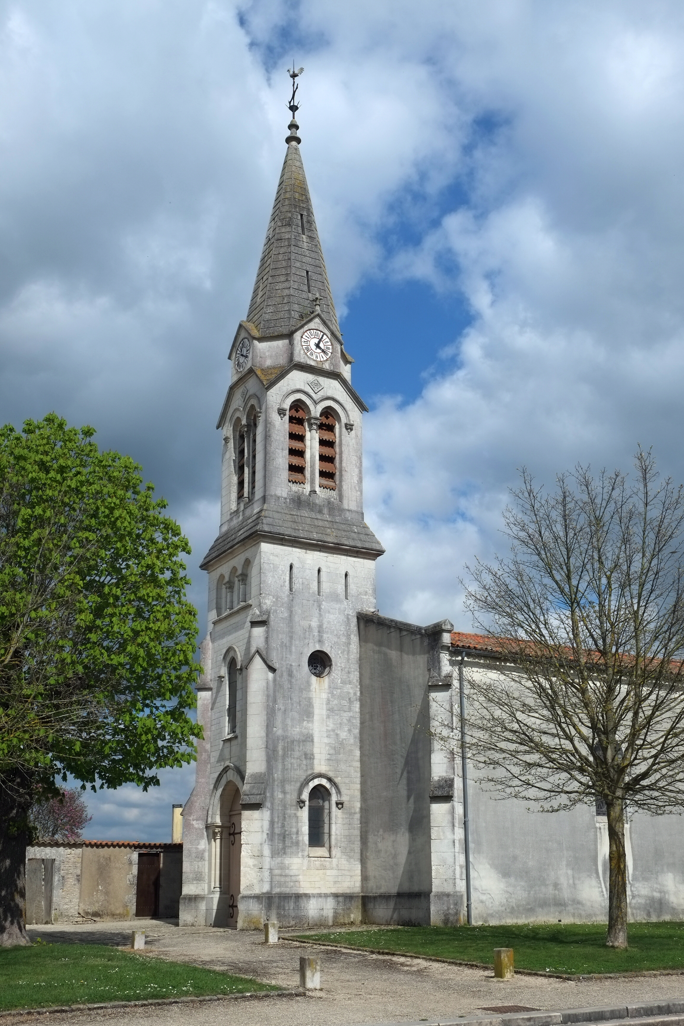 Église Notre-Dame de l'Assomption Vérines Charente-Maritime France